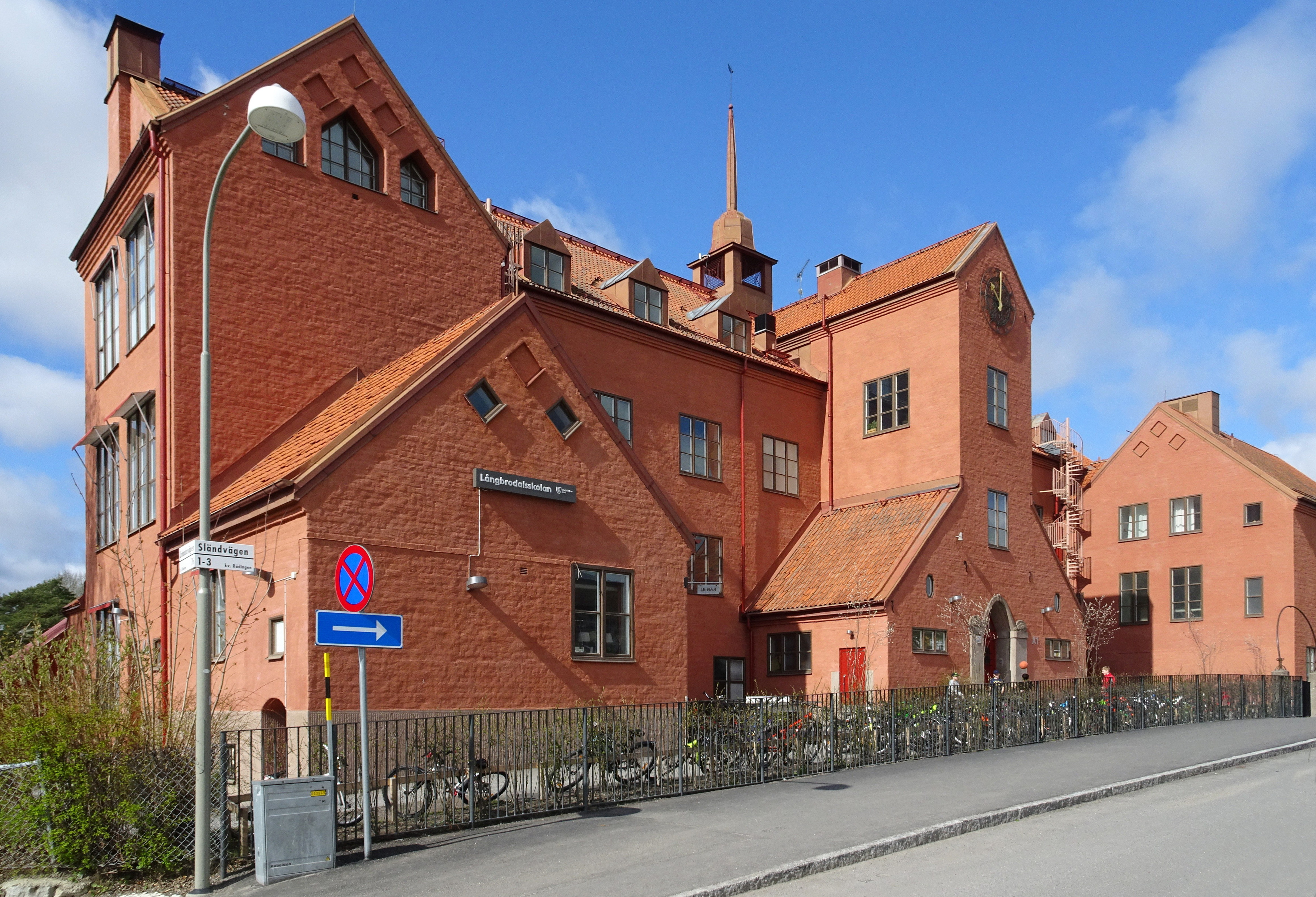 Långbrodalsskolan huvudbyggnad, arkitekt Georg A. Nilsson